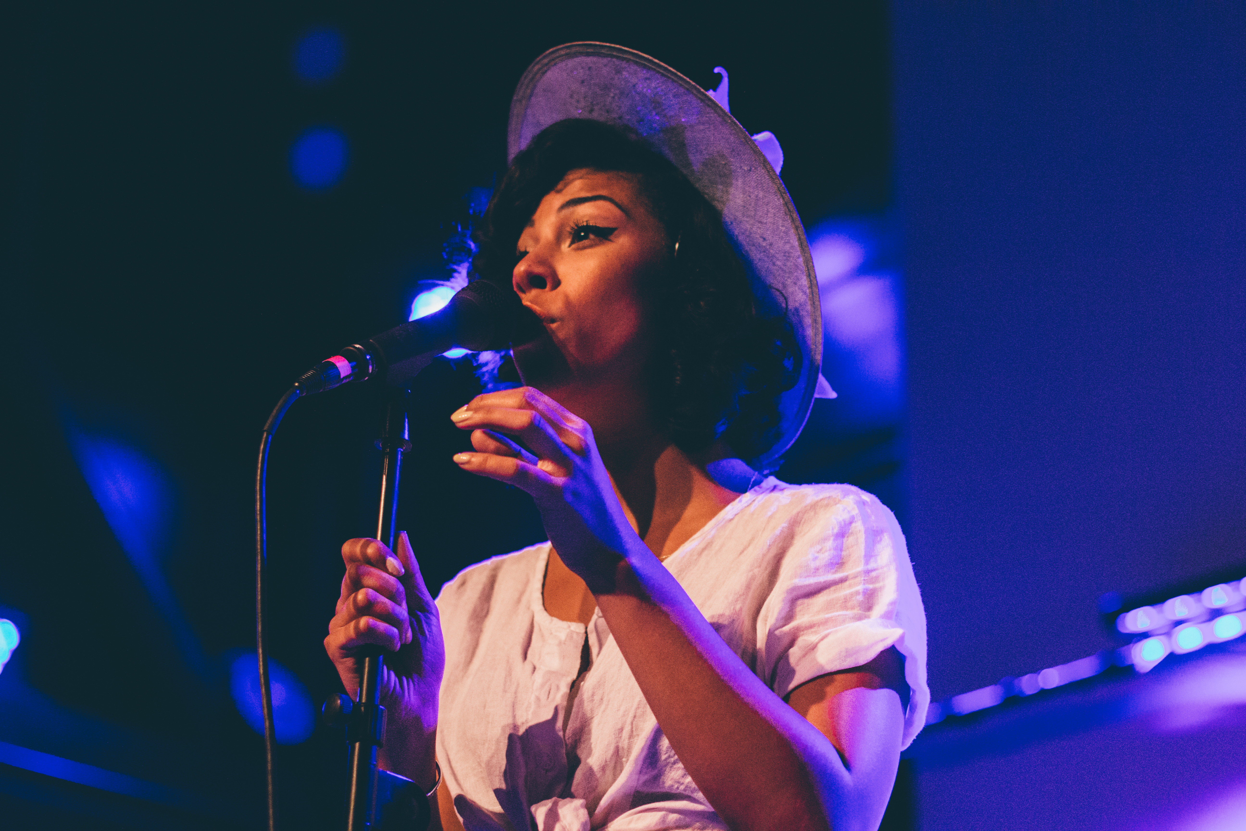 PHOX-4497